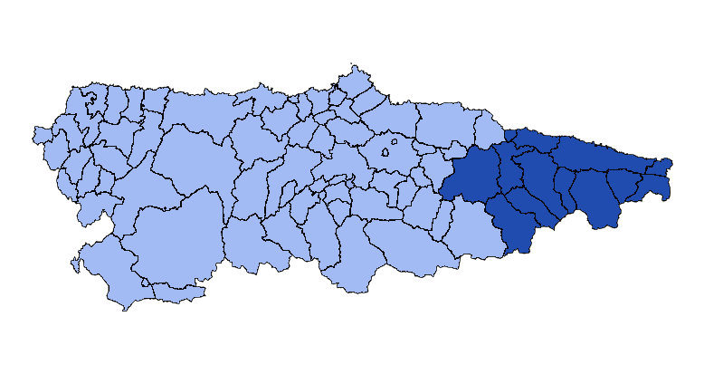 Concejos que forman la mancomunidad asturiana de los Concejos del Oriente de Asturias